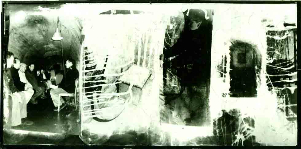 "Rhythmische Babylonische Wasserskulptur" Von oben nach unten-von unten nach oben. Fotografie/Schwammtechnik/Stahlrahmen/Hartfaserplatte 1,27 x 2,61 m Carl Vogel Sammlung